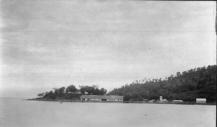 Foto. Een treinstation gezien vanaf de andere kant van de baai aan de noordwest kust van Bantam